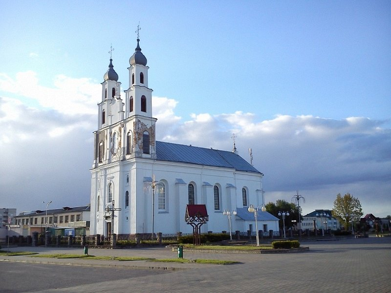 Дзятлава. Касцёл Найсвяцейшай Дзевы Марыі